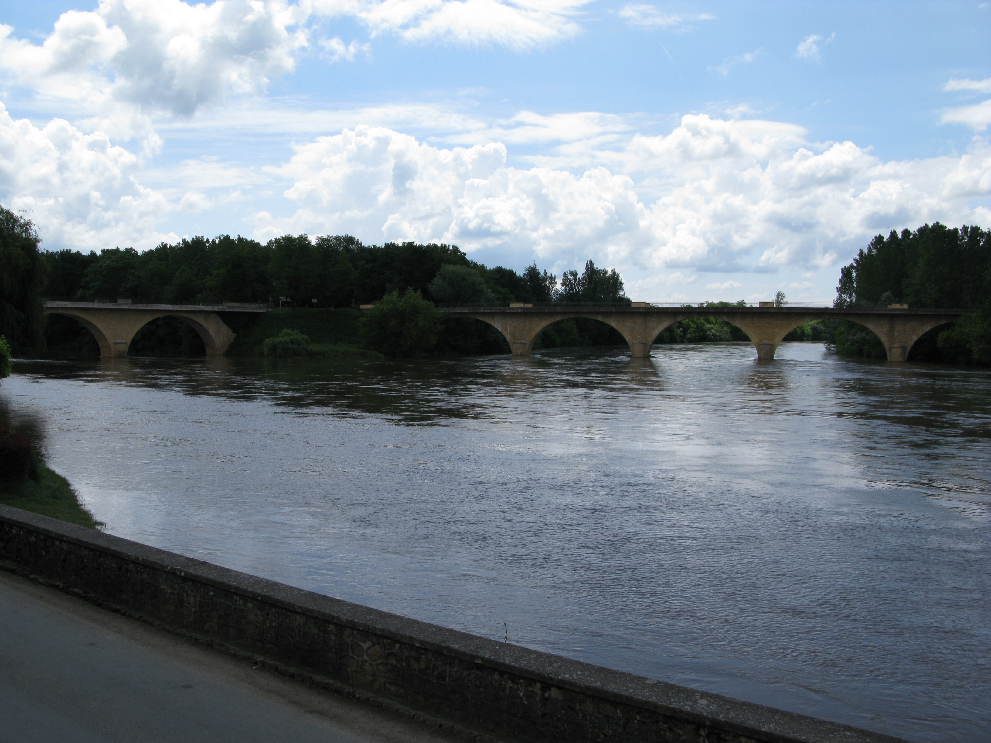 Confluent de la Dordogne et de la Vézère à Limeuil